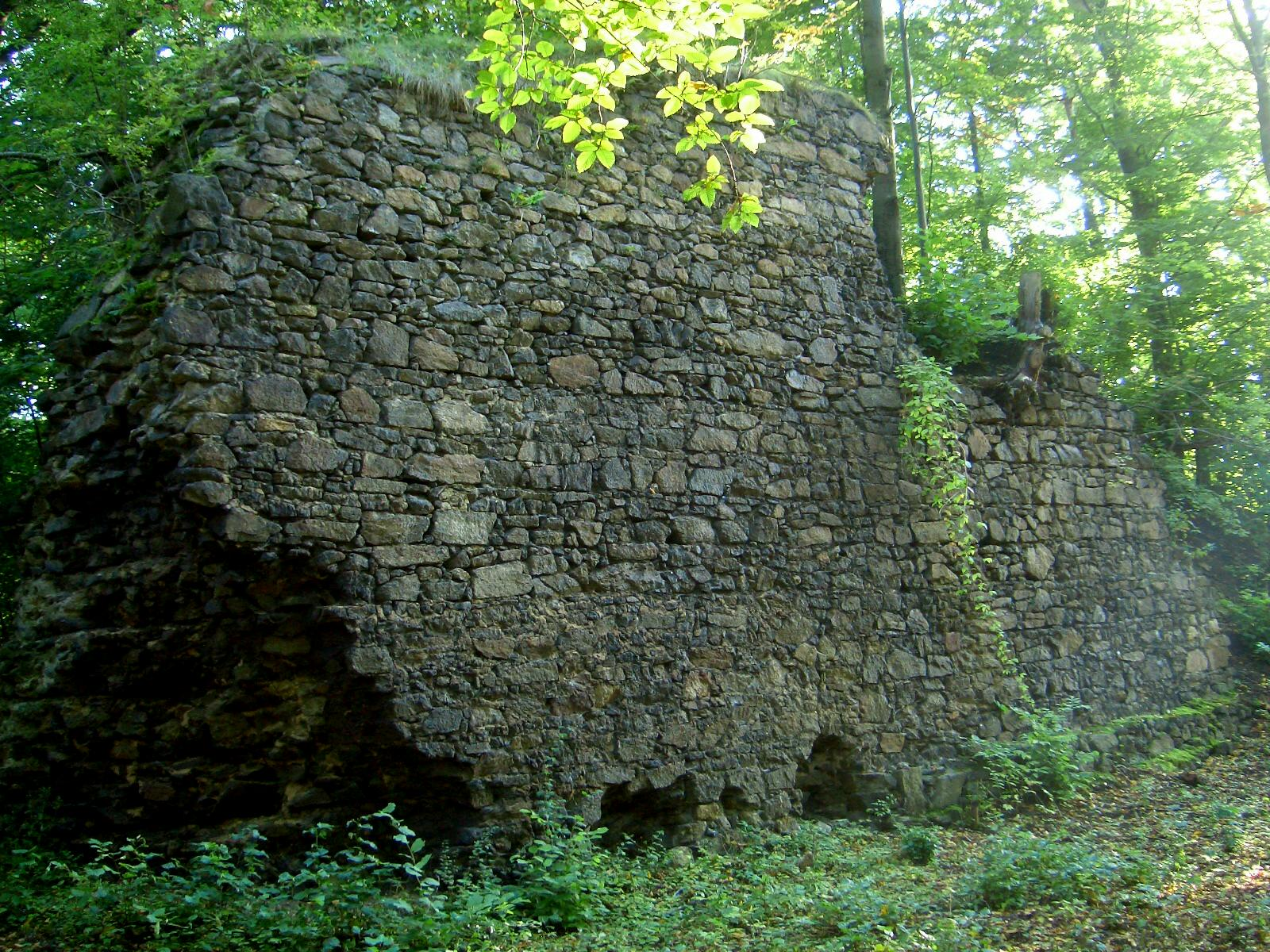 Reste der Burg Rohnau